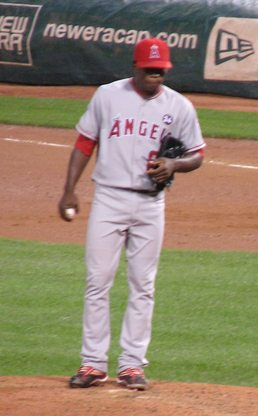 José Arredondo